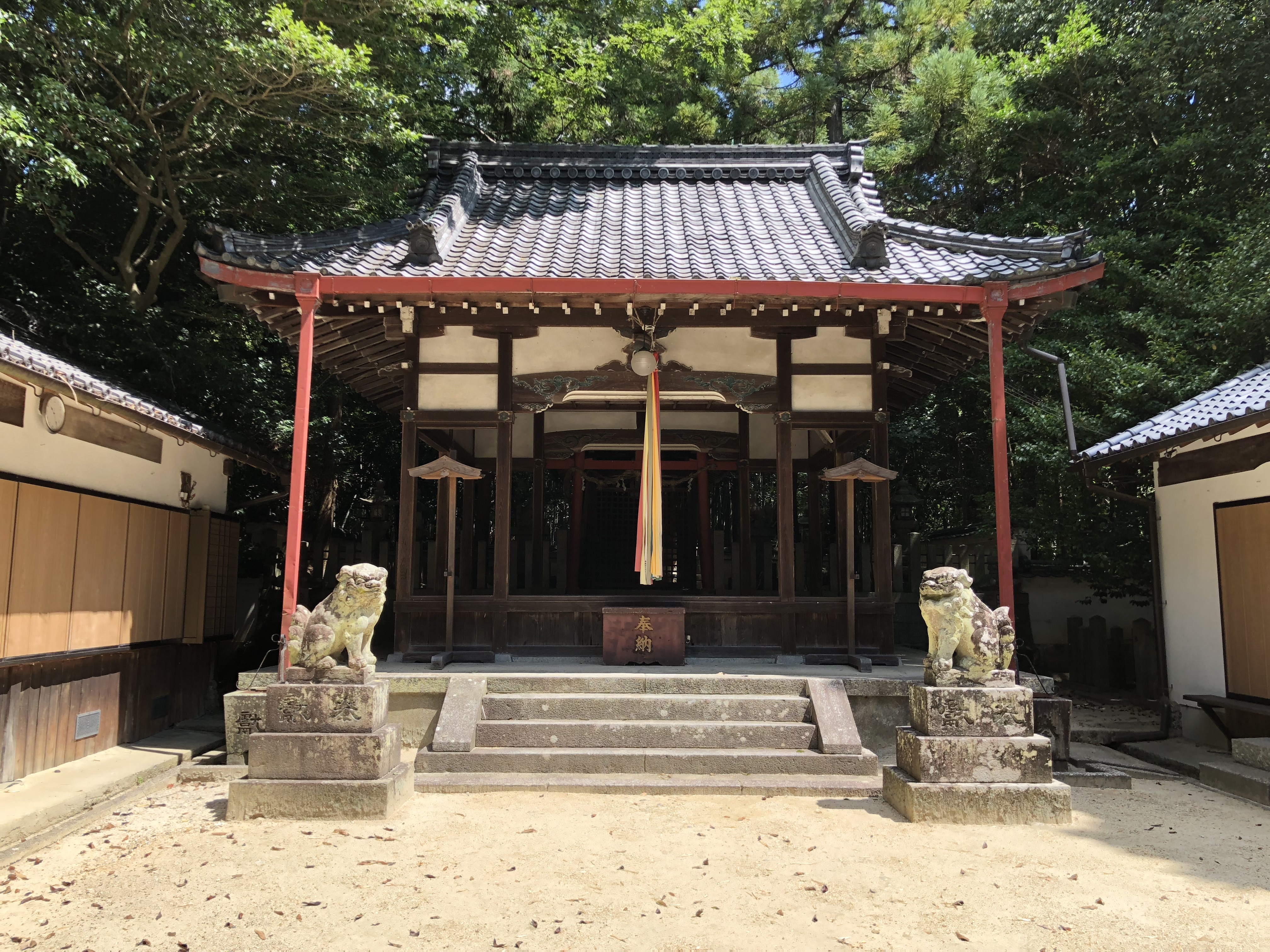 奈良市佐紀町小字西畑 佐紀神社 拝殿